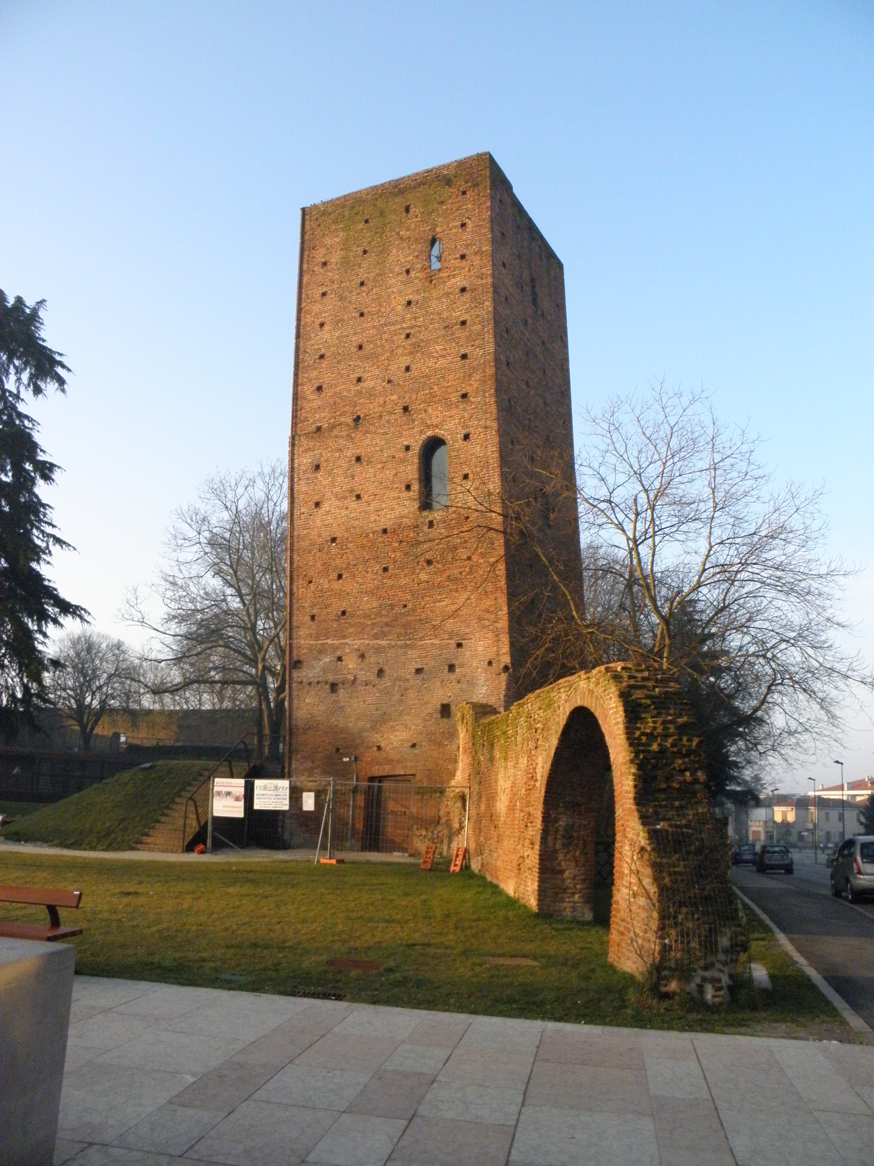 Rovigo, il castello: Torre Grimani, citata anche come Torre mozza.